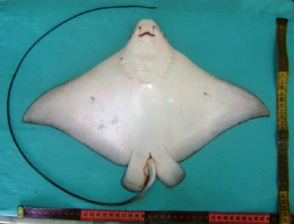 Aetobatus flagellum, скат рода орляковых скатов